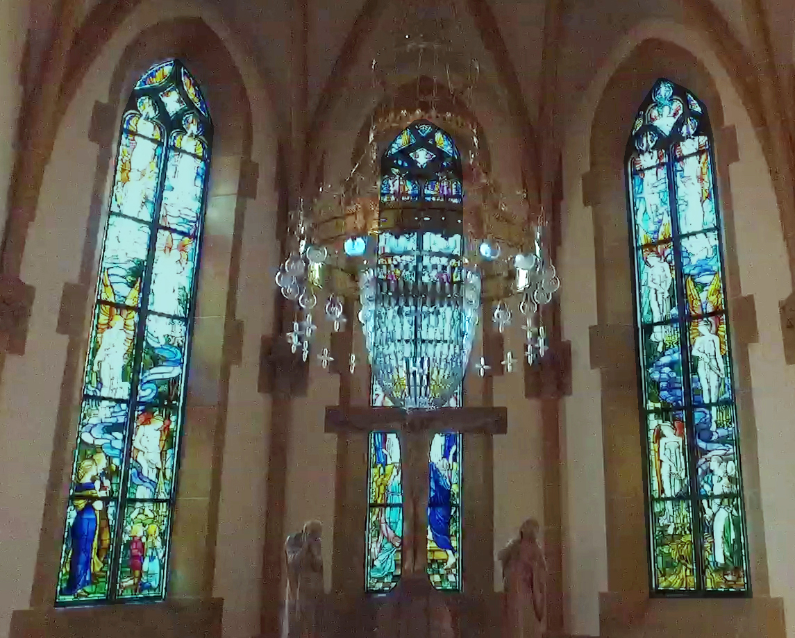 Fenster im Westchor der Heilig-Kreuz-Kirche in Röthenbach an der Pegnitz. Entwurf: Walter Crane, Ausführung: Joseph Arthur Dix